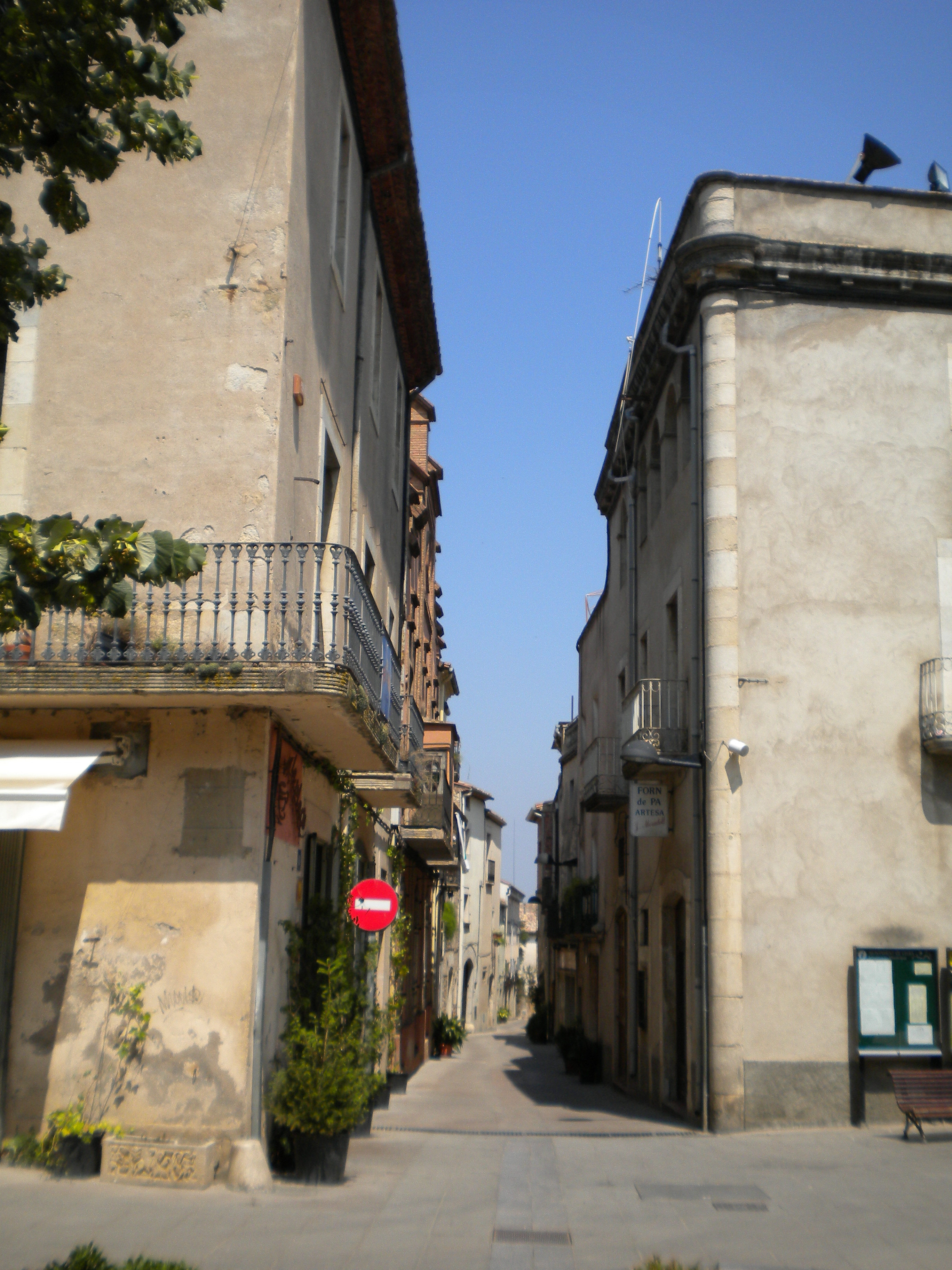 Aquest carrer fou fins a finals del segle XX el centre comercial de la vila